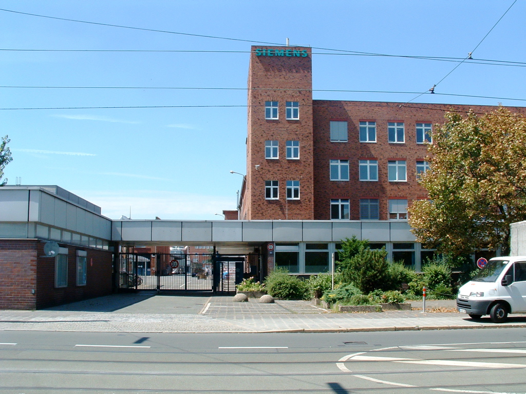 Siemens Standort Nürnberg Vogelweiherstraße (Nordeingang)